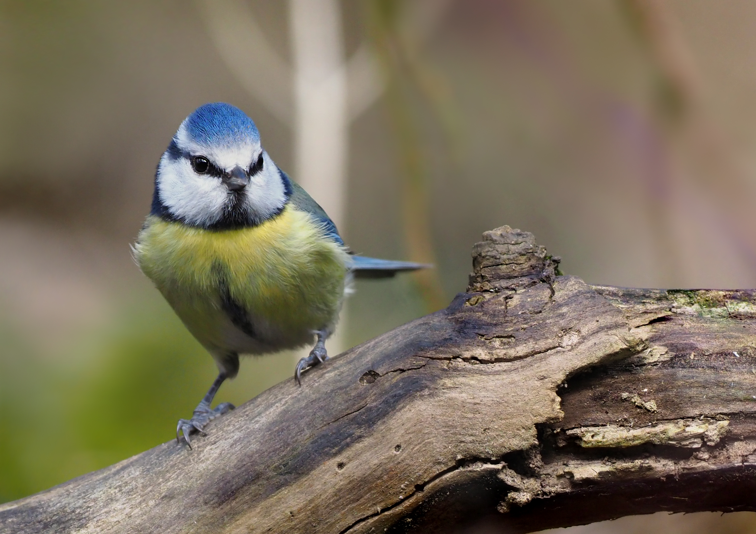 Blue tit (Cyanistes caeruleus), Parc du Rouge-Cloître, Brussels